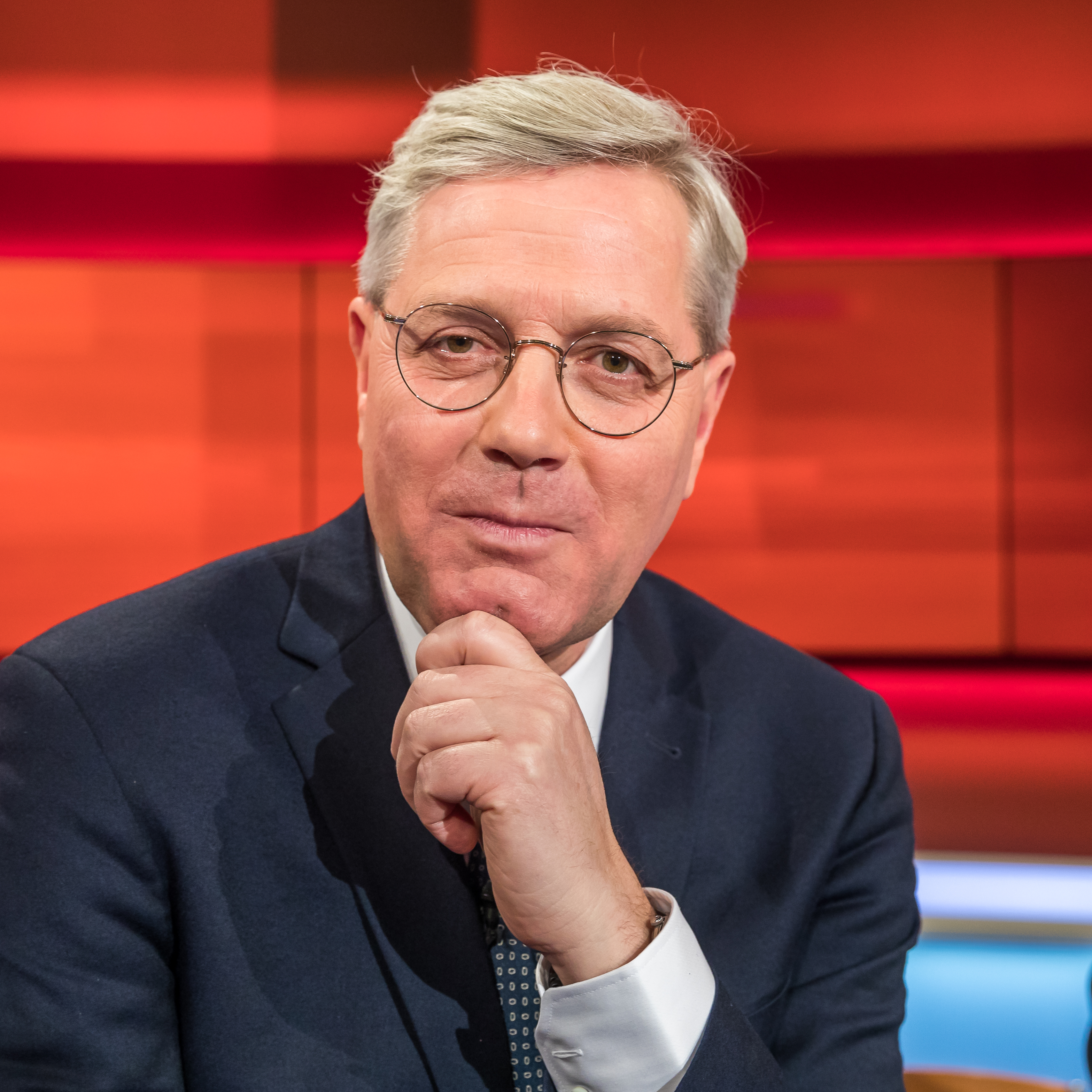 Pressetermin nach der Sendung „Hart aber Fair“ am 10. Februar 2020. Thema der Sendung: „Jetzt auch die CDU: Stürzt die nächste Regierungspartei ins Chaos?" Foto: Norbert Röttgen, CDU, Vorsitzender des Auswärtigen Ausschusses